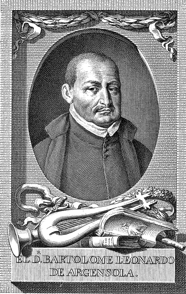 Retrato de Bartolomé Leonardo de Argensola